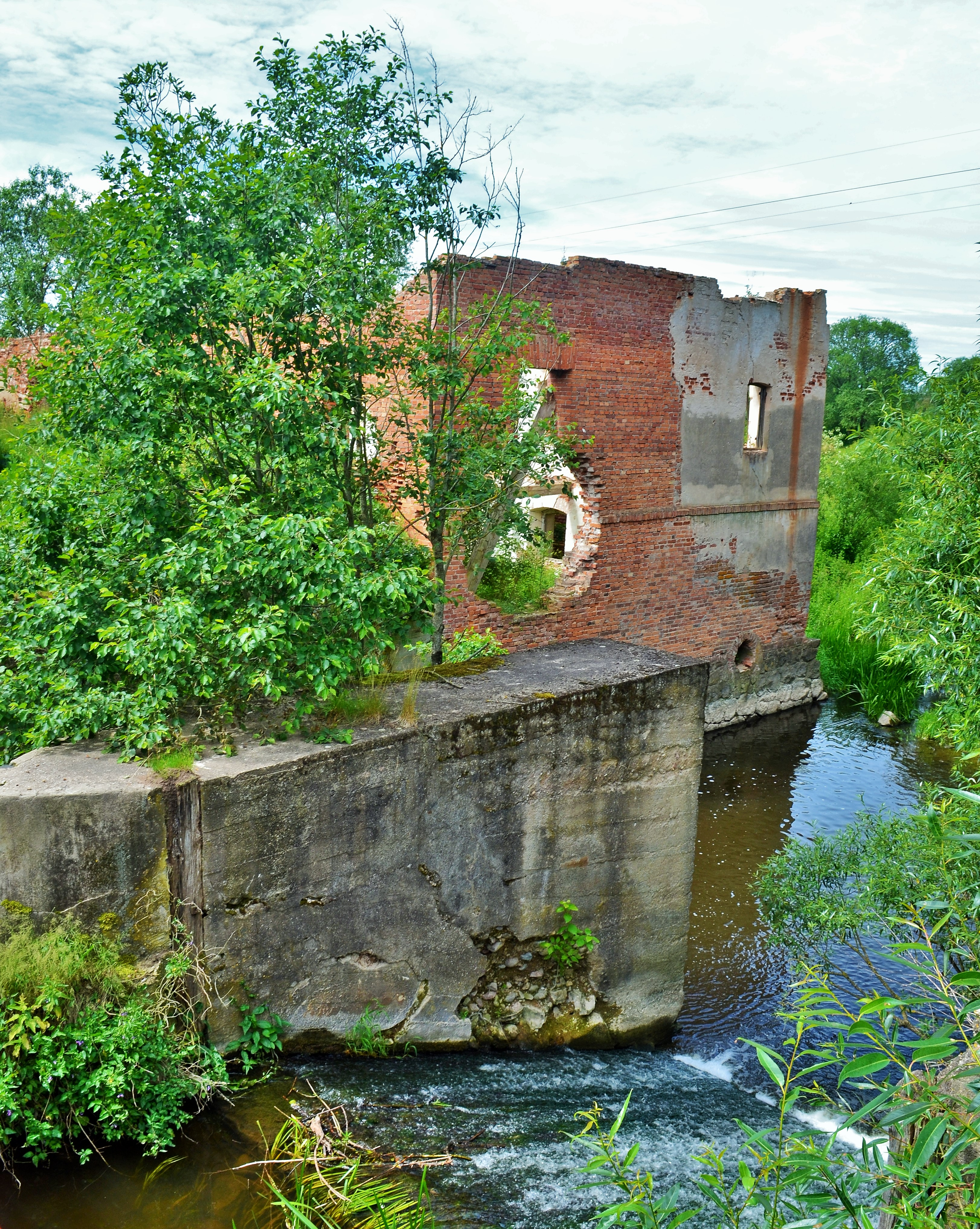 Pakščių vandens malūno ant Obels griuvėsiai, Kėdainių raj.